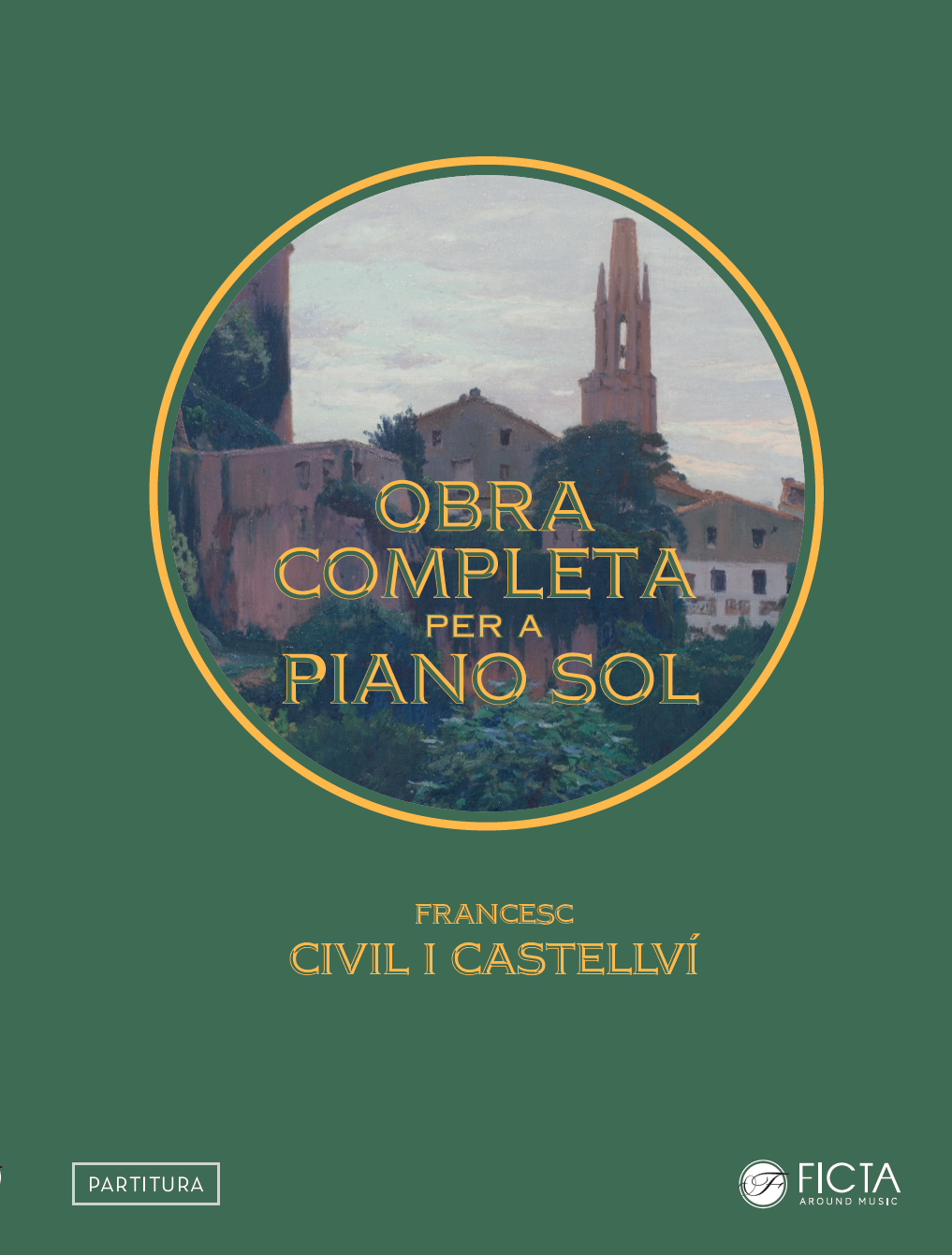 Partitura de la integral per a piano sol de Francesc Civil i Castellví en una edició a cura de Miquel Villalba publicada per Ficta edicions i produccions sl. Imatge de la portada quadre "Girona" de Santiago Rusiñol.